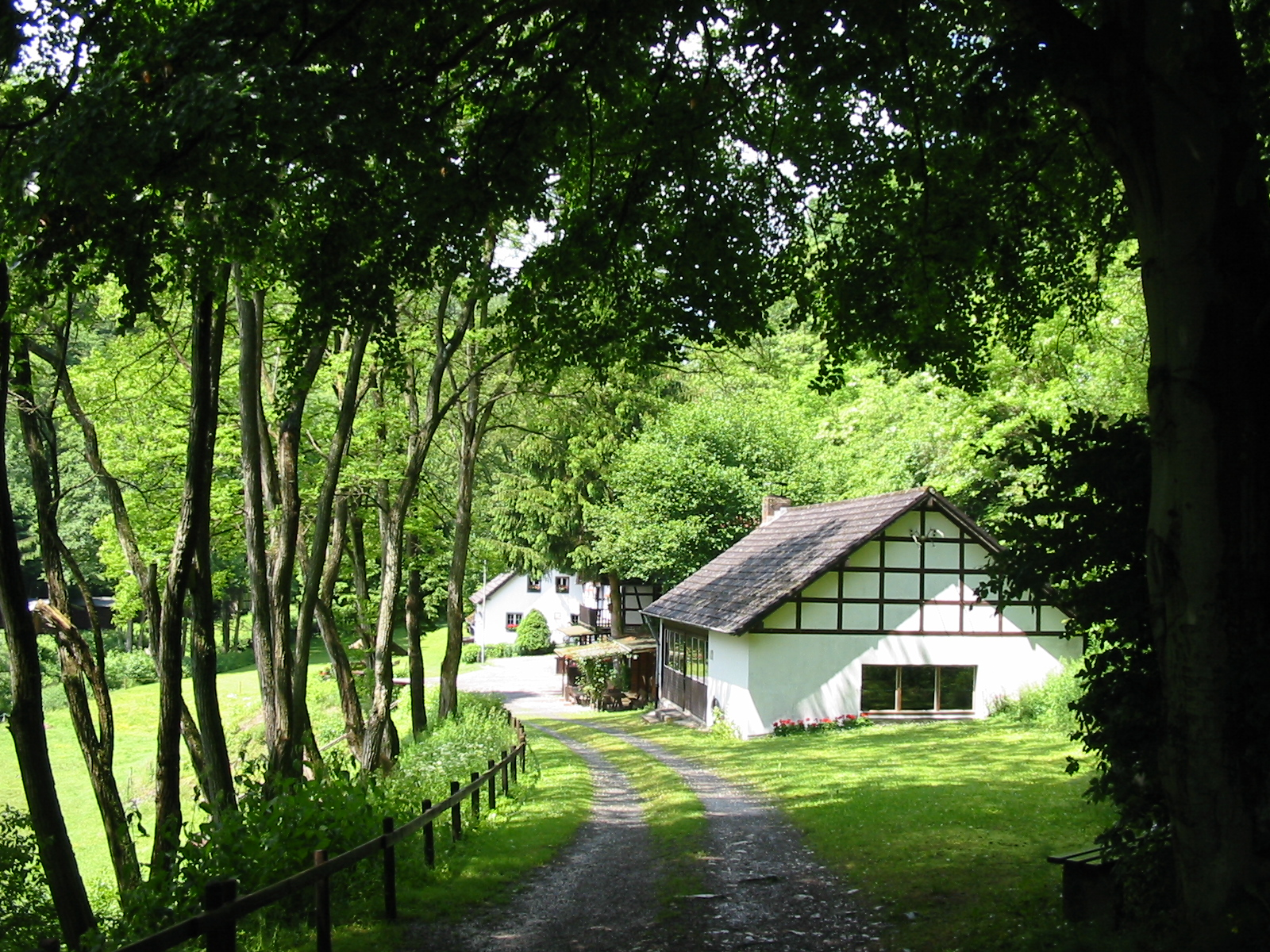 Schilsbachtal, near Woffelsbach, / Eifel, Germany